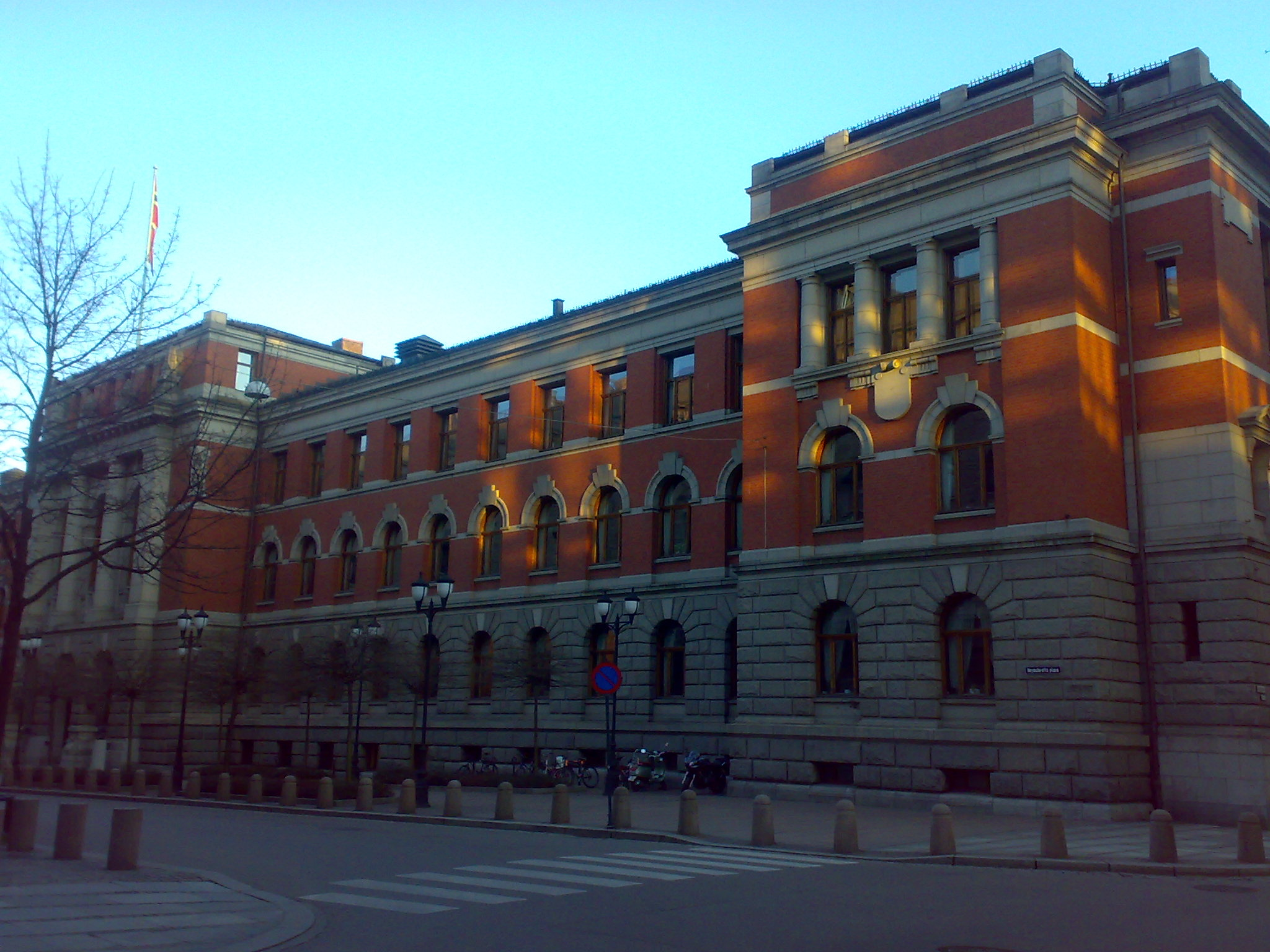 Høyesterett, Norwegian High Court, Oslo, Norway